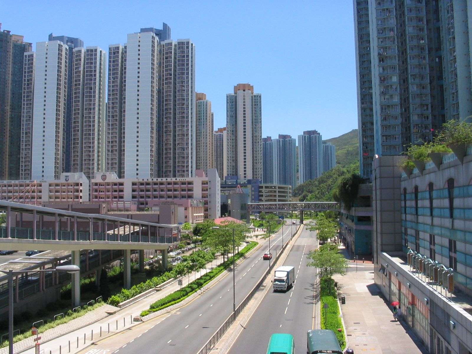 將軍澳-唐明街 Tong Ming Street, Tseung Kwan O